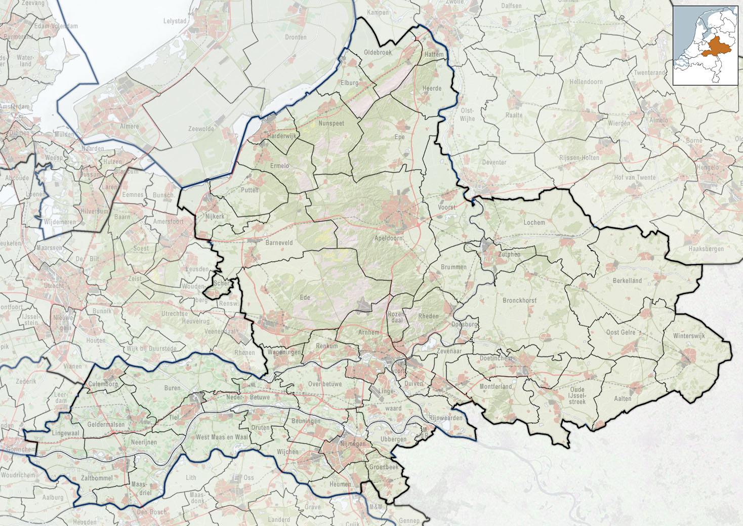 Referentiekaart van Provincie Gelderland, met indeling van gemeenten (2010) en impressie van het landschap. Door Jan-Willem van Aalst, samengesteld uit publiek beschikbare geo-data: Referentie-ondergrond (kustlijn, steden, wegen) gerasterd uit de OpenStreet Map OSM. ( Inhoud is beschikbaar onder de Creative Commons Attribution-ShareAlike 3.0 license. Referentie-ondergrond op water bewerkt vanuit Gebruik is vrij met bronvermelding NLR en ESA. Vectorgrenzen van gemeenten en regio's vrij ter beschikking gesteld met dank aan cartografen van brandweerregio's Hollands-Midden en IJsselland; gerasterd in Photoshop. Hoogte-aanduidingen (reliëf) gerasterd uit de AHN Viewer ( gebruik is vrij met bronvermelding (c) AHN, Overige kenmerken op de kaart: eigen tekenwerk van Jan-Willem van Aalst, op basis van gerasterde gemeentegrenzen.